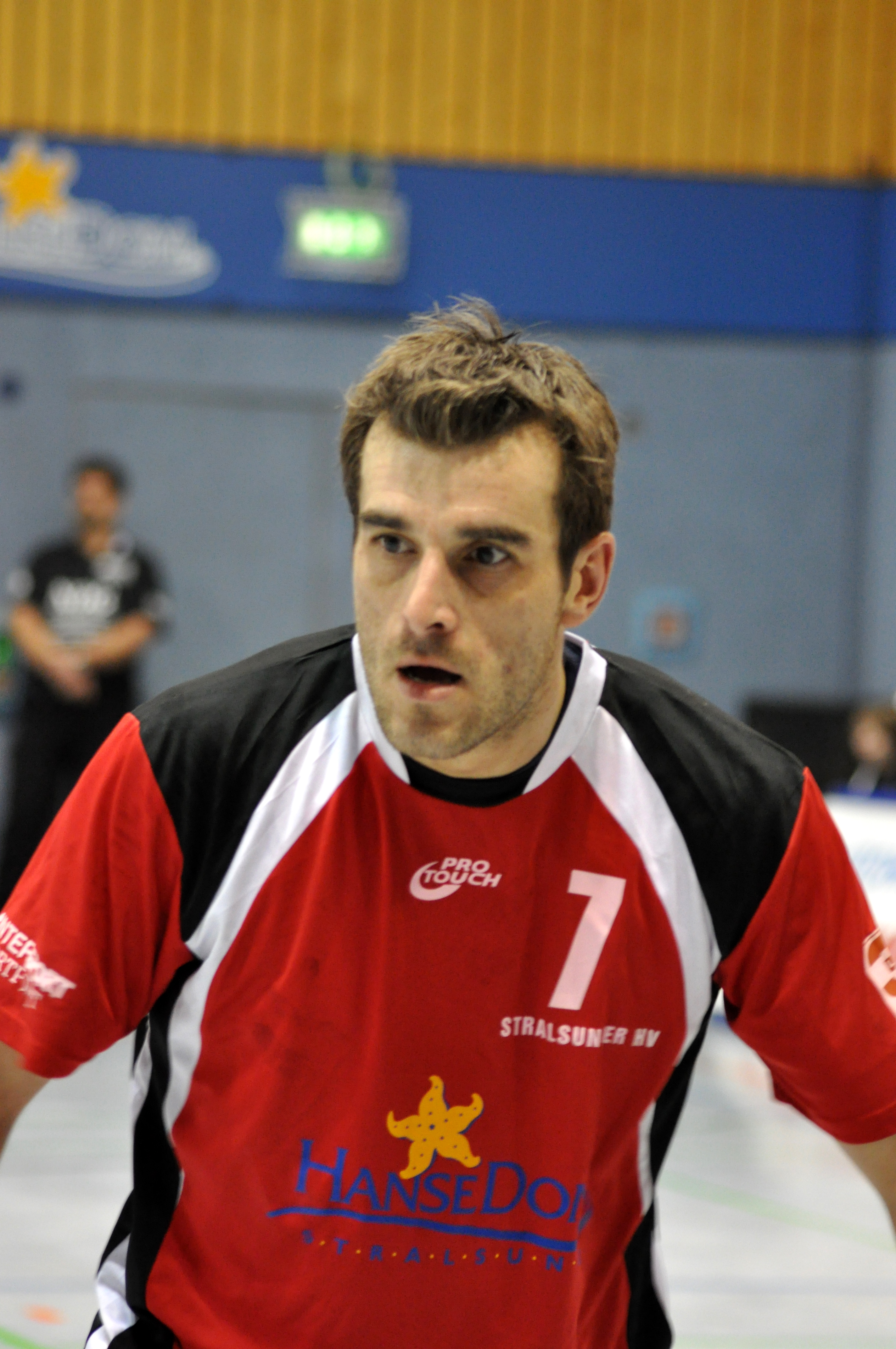 Bilder vom Punktspiel des Stralsunder HV in der de:3. Liga (Handball) am 12. Februar 2011 in der Vogelsanghalle Stralsund gegen den Oranienburger HC (35:34). Ivo Töllner am 12.2.2011.